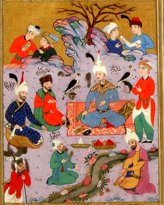 Secaatname 0246